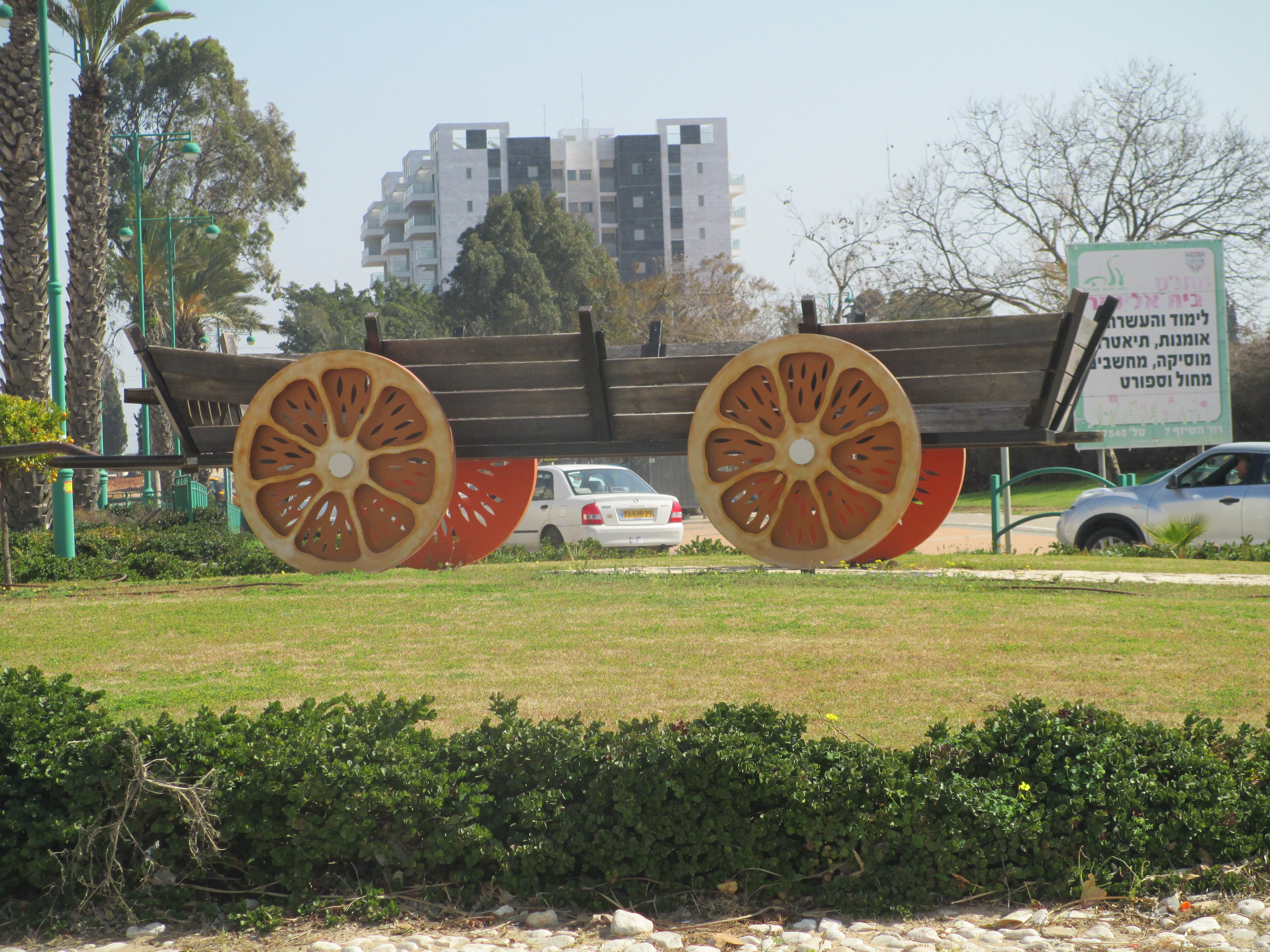 פסל עגלה עם גלגלים בצורת תפוזים ברחוב חטיבת גולני בחדרה